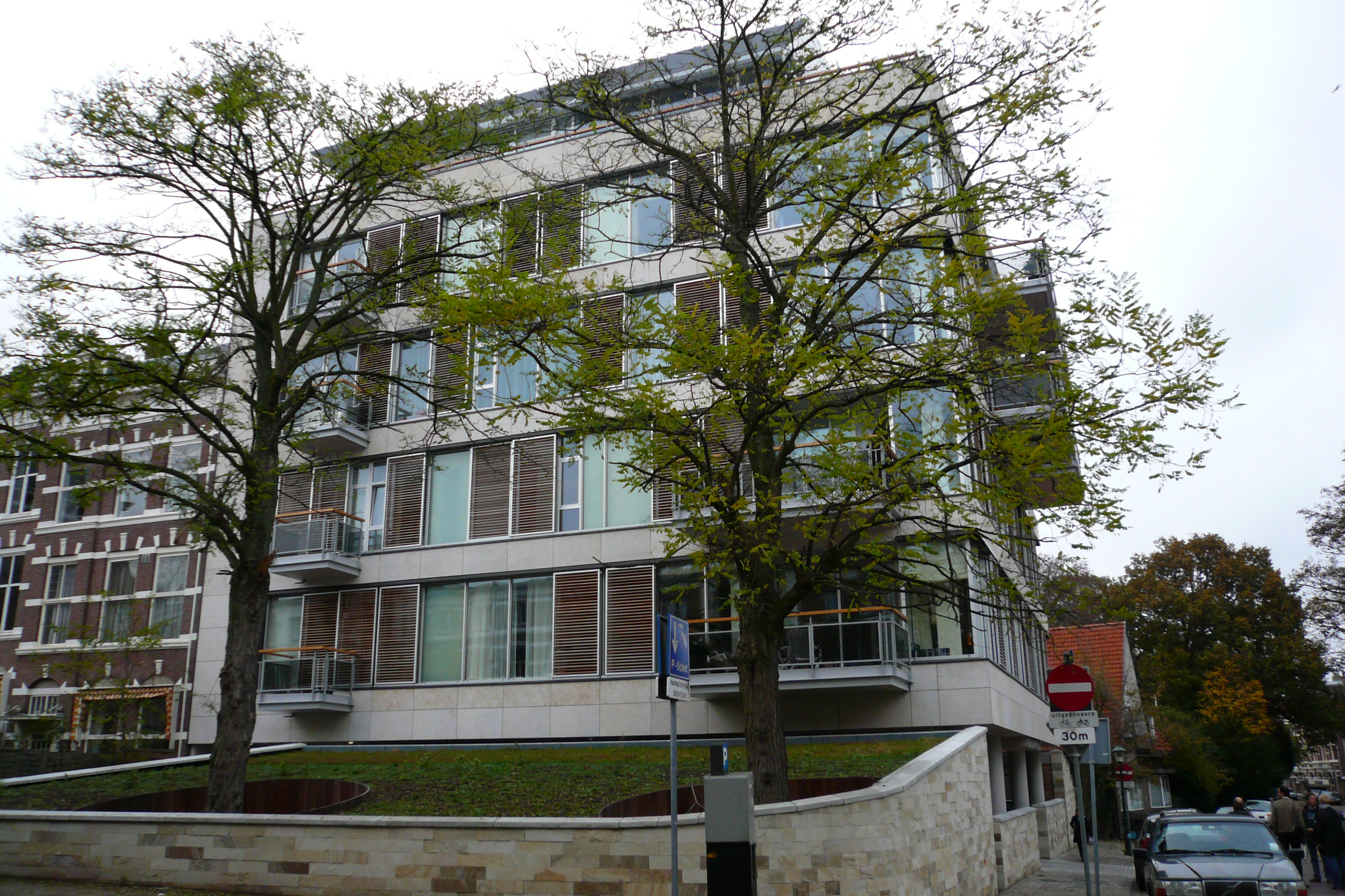 Hoge Banka, Den Haag